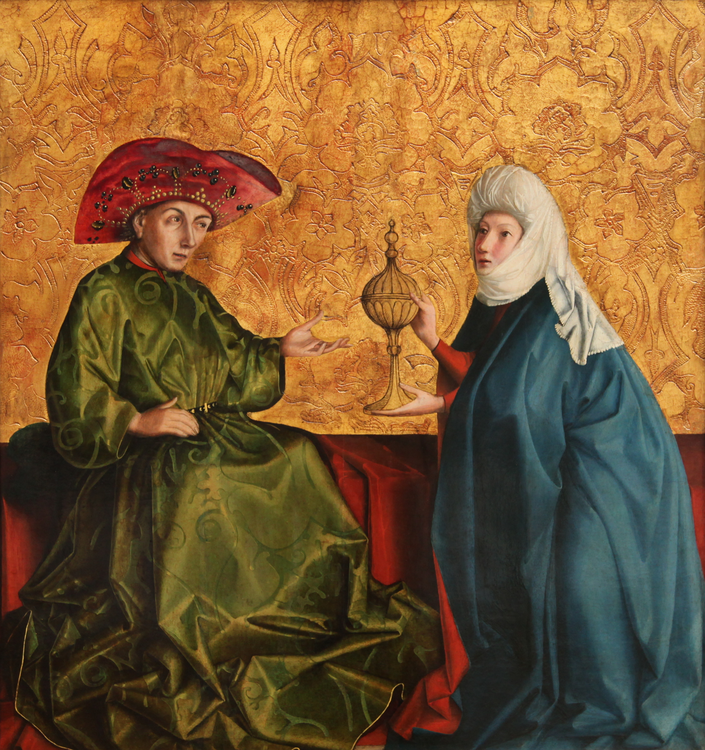 Heilsspiegelaltar, rechter Flügel innen, Szene oben links: König Salomo und die Königin von Saba